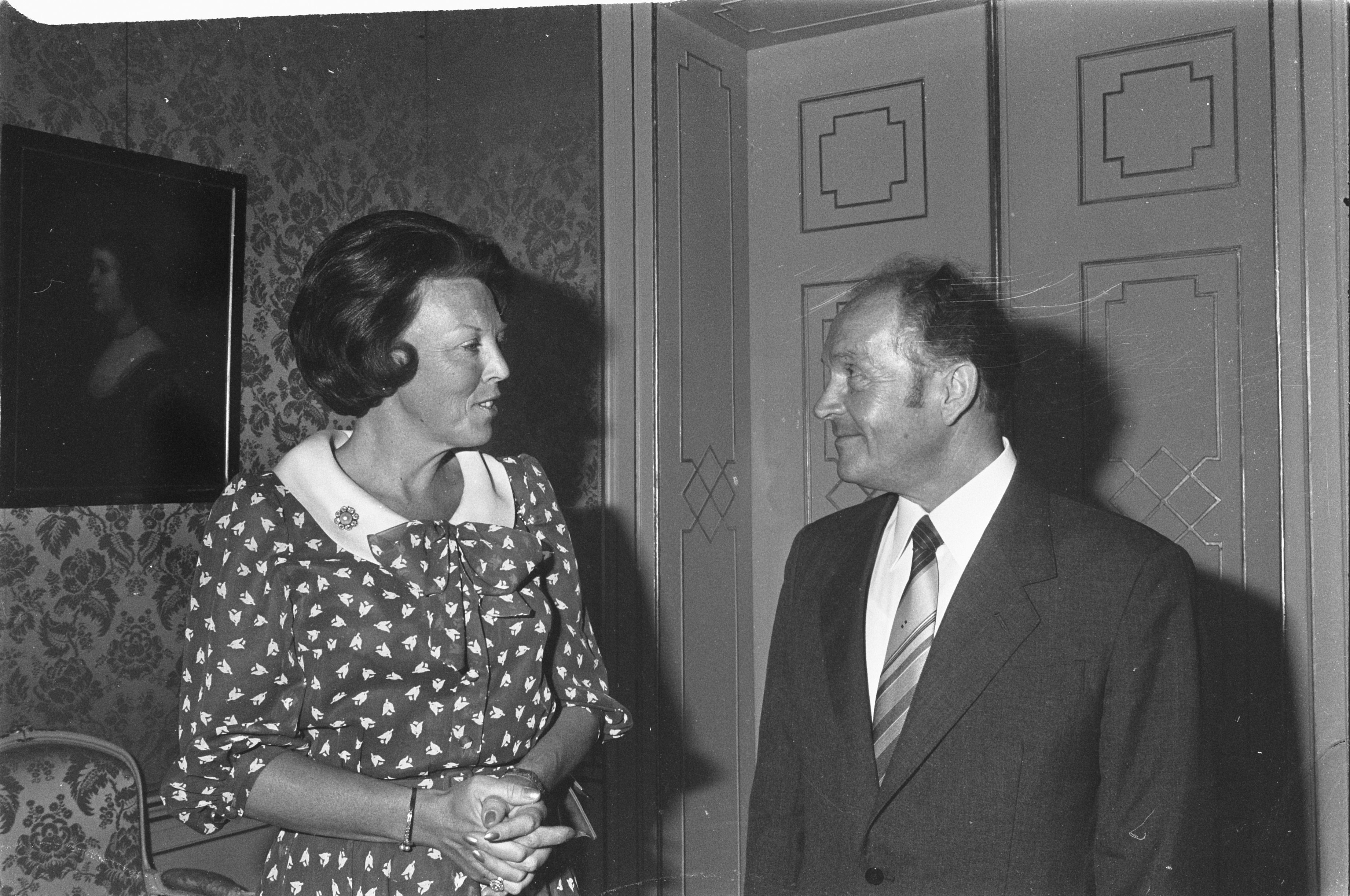 Collectie / Archief : Fotocollectie Anefo Reportage / Serie : [ onbekend ] Beschrijving : Koningin Beatrix ontvangt DDR minister van Buitenlandse Zaken Fischer Datum : 3 juli 1984 Trefwoorden : koninginnen, ministers, ontvangsten Persoonsnaam : Beatrix, koningin Fotograaf : Fotograaf Onbekend / Anefo Auteursrechthebbende : Nationaal Archief Materiaalsoort : Negatief (zwart/wit) Nummer archiefinventaris : bekijk toegang 2.24.01.05 Bestanddeelnummer : 933-0211